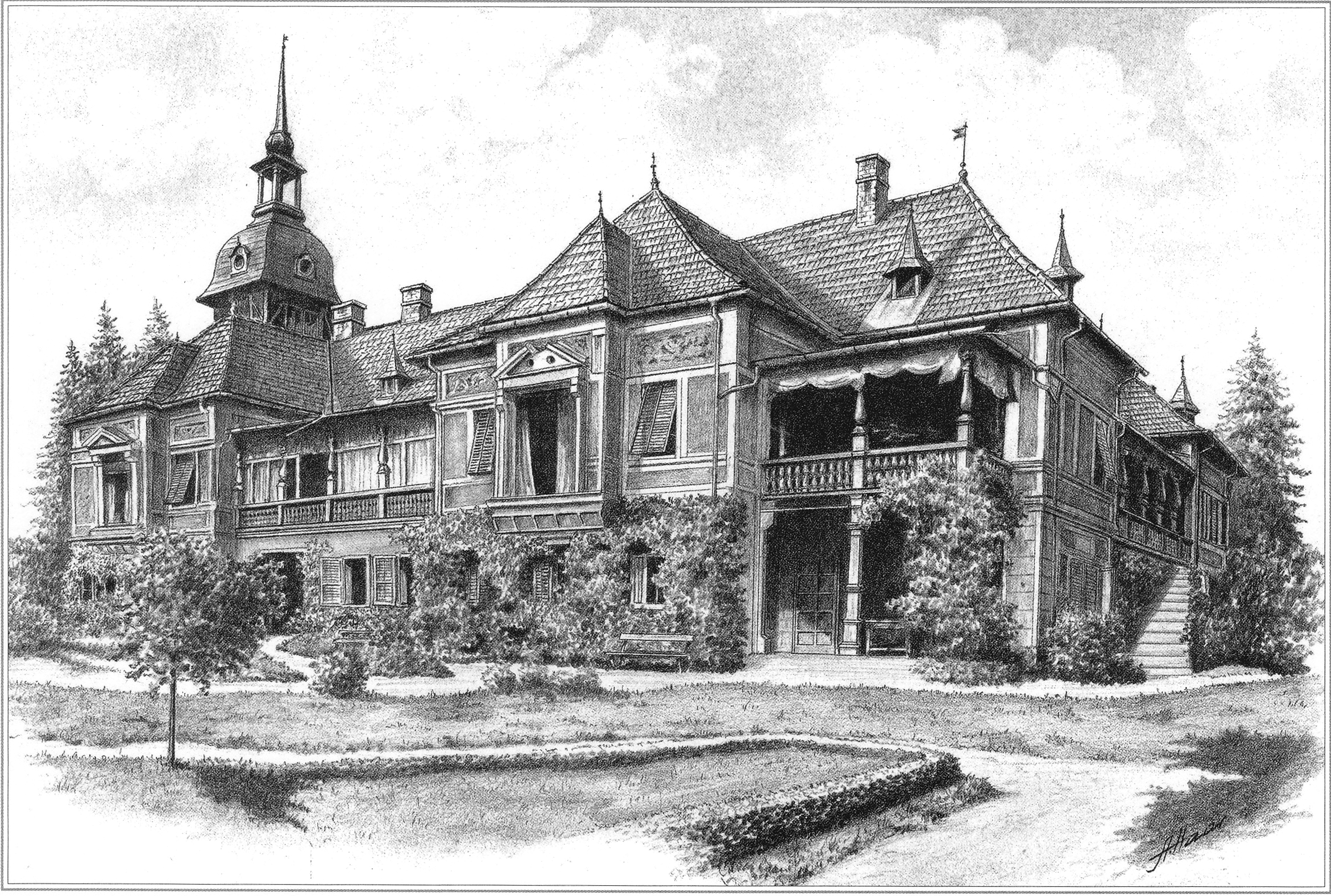 Liezen, Dumba-Villa, Endzustand